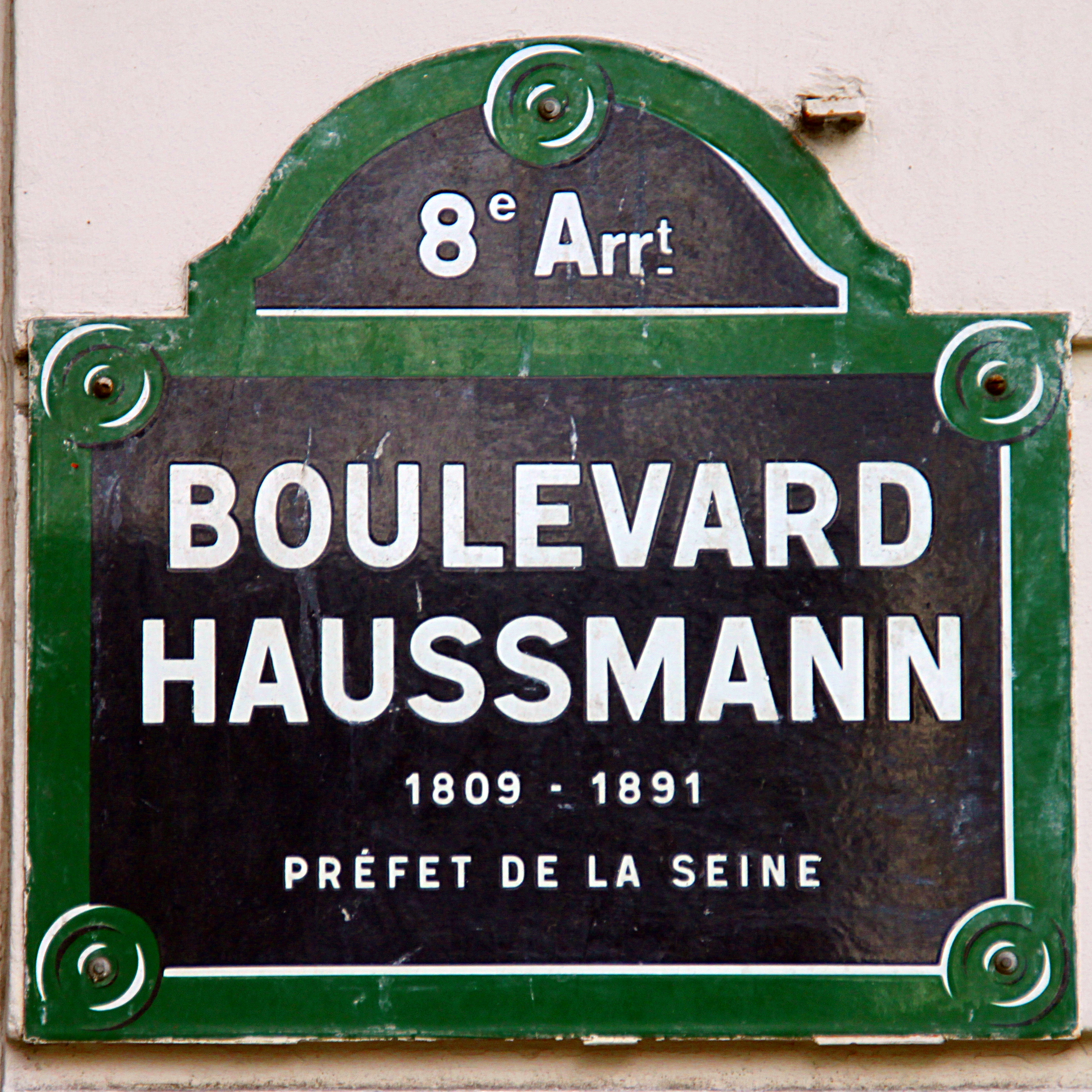 Boulevard Haussmann (Paris)